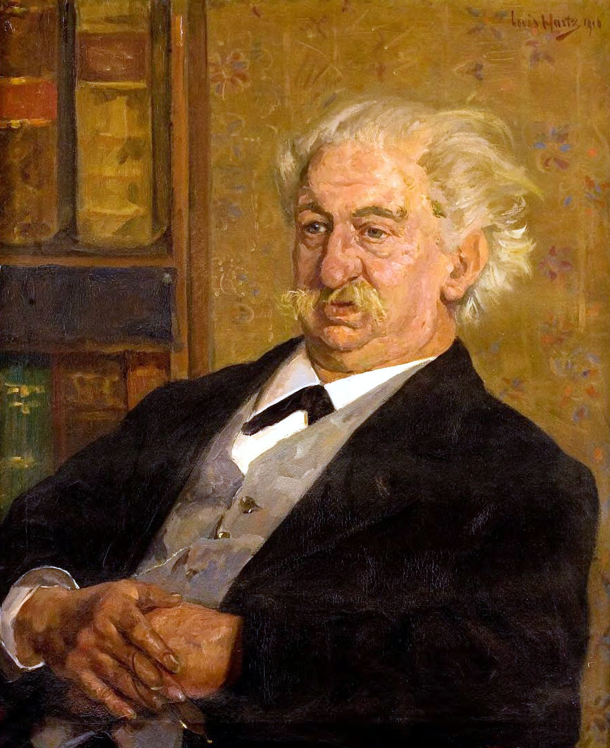 Jacobus Johannes Hartman (1851-1924) niederländischer Altphilologe. Icones Leidenses 304